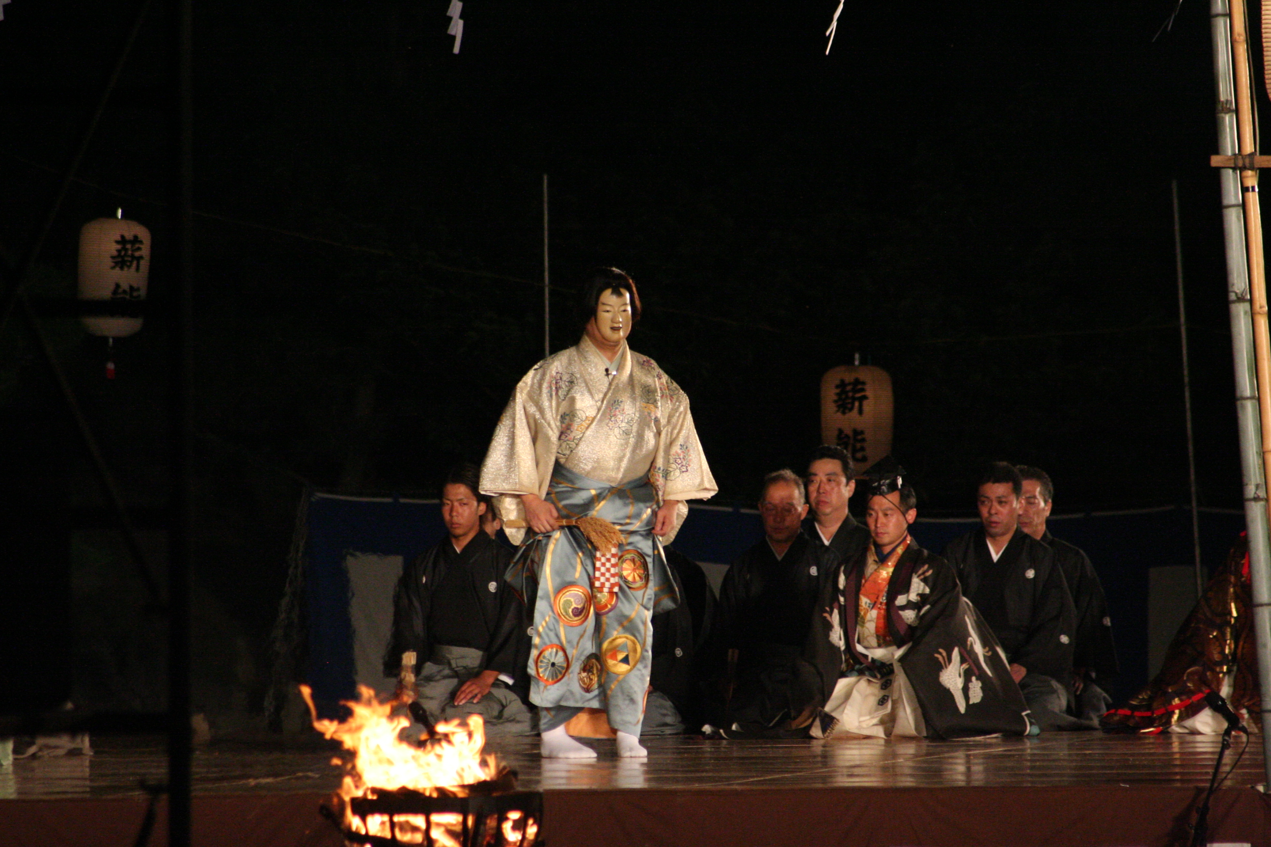 2009年7月31日に姫路城三の丸広場で行なわれた姫路薪能の様子。